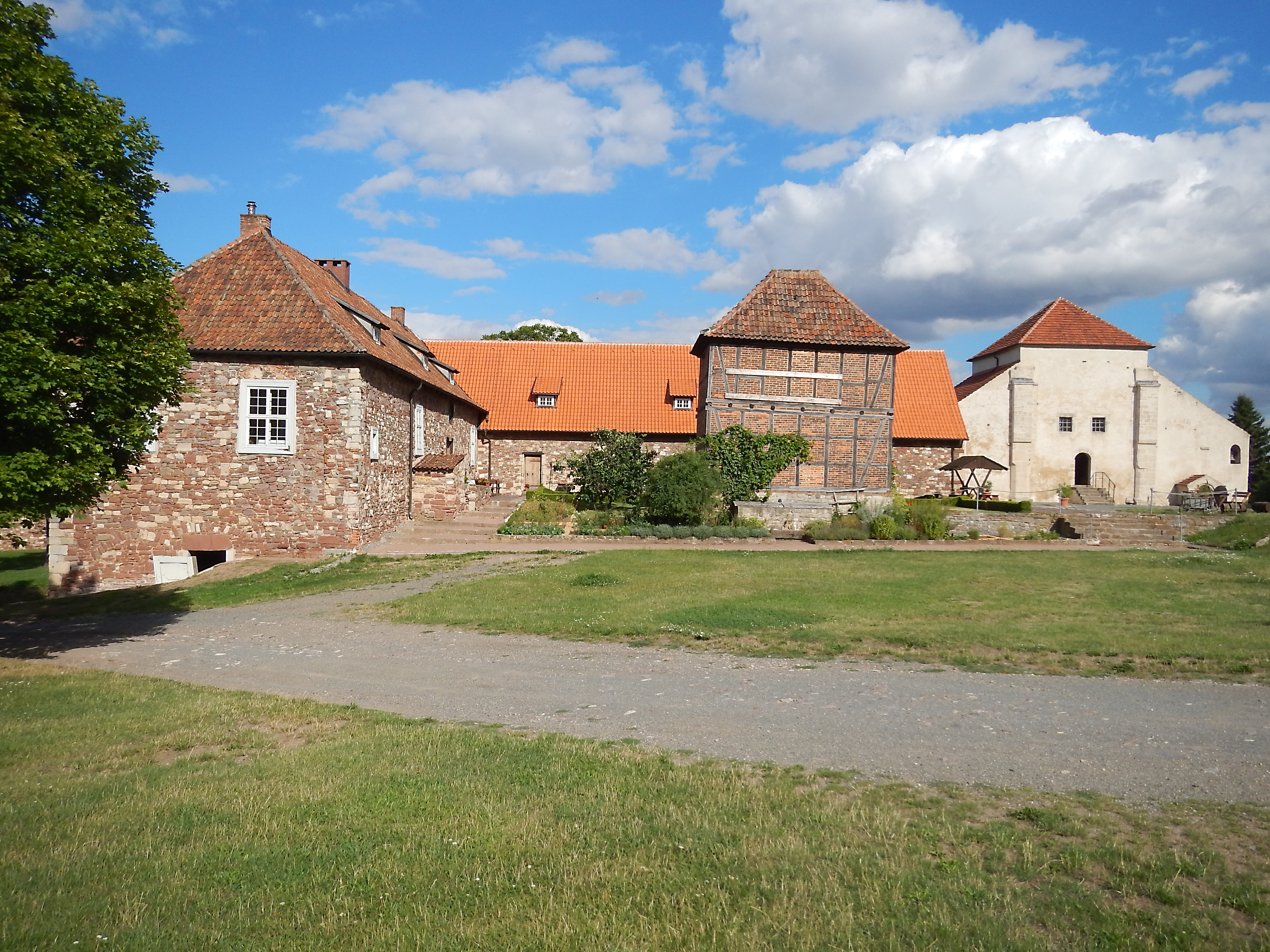 Förderkreis Konradsburg e.V. Ermsleben Konradsburg 2 06463 Ermsleben